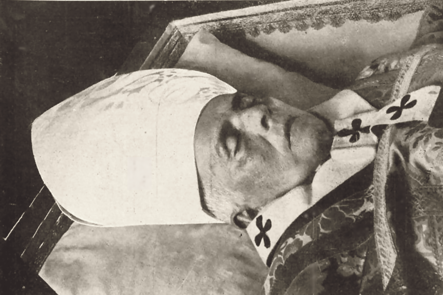 Morte e translado do corpo do Cardeal Arcebispo do Rio de Janeiro em abril de 1930, Joaquim Arcoverde de Albuquerque Cavalcanti. O corpo no caixão mortuário.